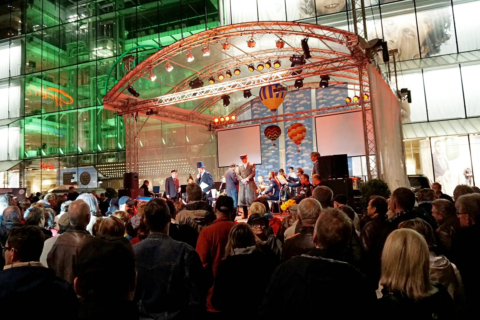 Chemnitz, Tage der Industriekultur 2015, Hauptbühne am Neumarkt